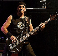 Beto Ceriotti, bajista de almafuerte